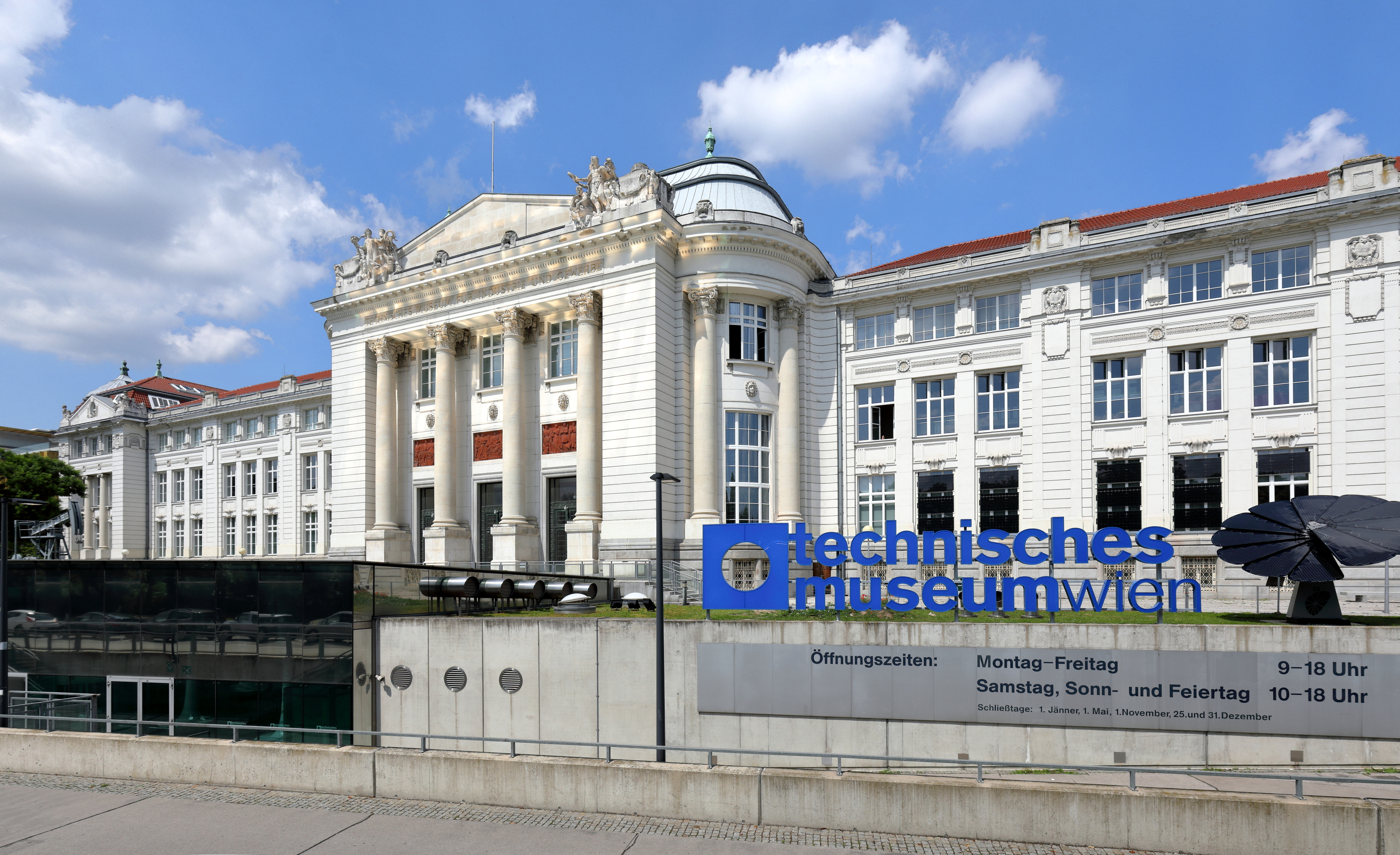 Die Hauptfassade des Technischen Museums an der Adresse Mariahilfer Straße 212 im 14. Wiener Gemeindebezirk Penzing.Das Gebäude wurde ab 1909 nach Plänen des Baurats Hans Schneider errichtet und am 6. Mai 1918 als „Technisches Museum für Industrie und Gewerbe“ eröffnet. 1992 wurde es zwecks Sanierung, Umbau und Vergrößerung geschlossen und am 17. Juni 1999 wieder eröffnet.